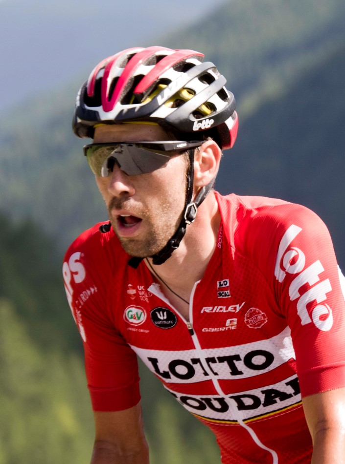 20-7_9 de gendt